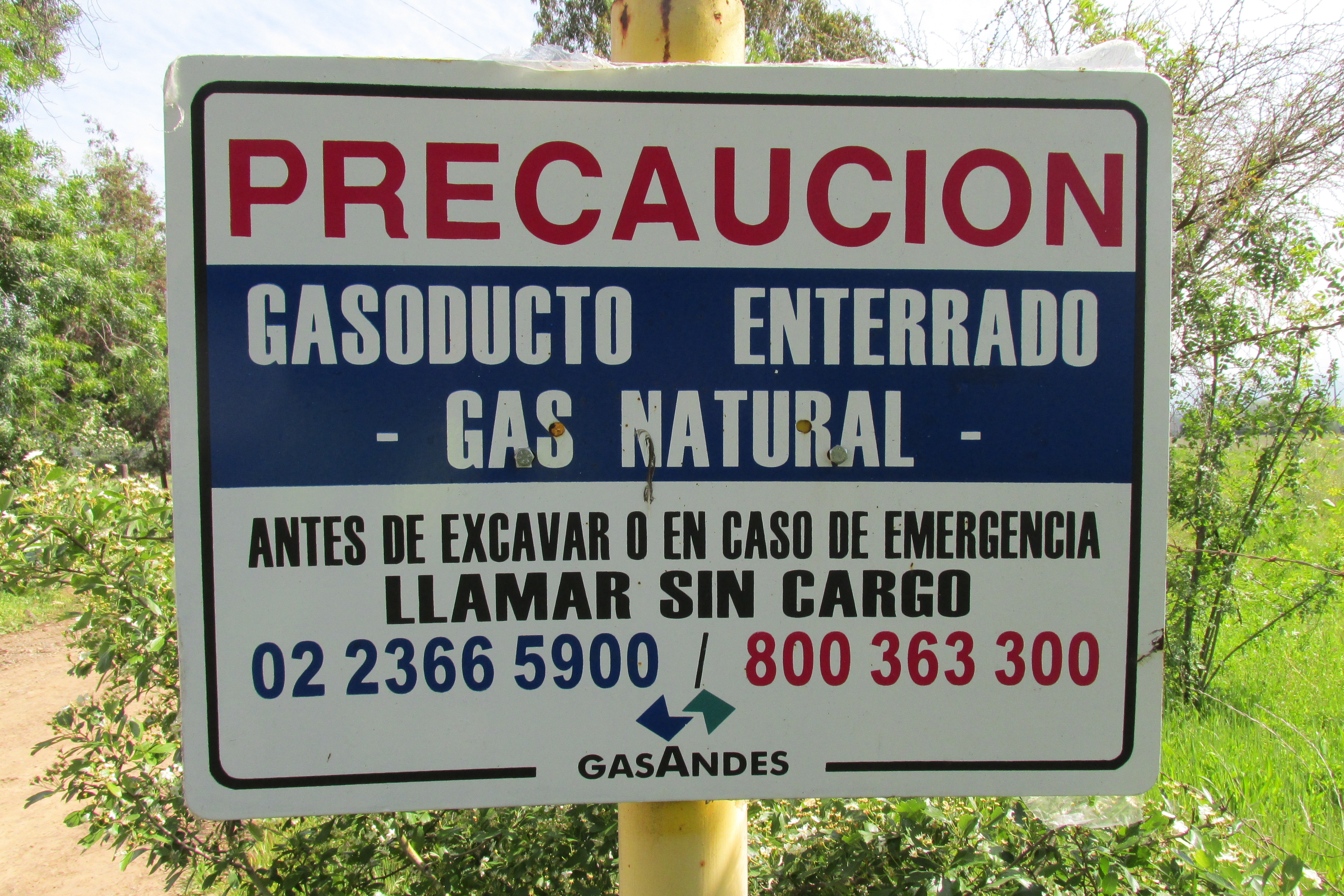 Señalética Gasoducto Gasandes, ubicada en sector La Punta comuna de Mostazal, región de O'Higgins Chile.